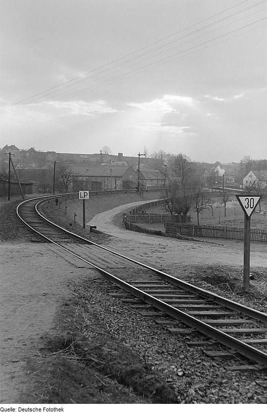 Original image description from the Deutsche Fotothek Unbeschrankter Bahnübergang mit Andreaskreuz